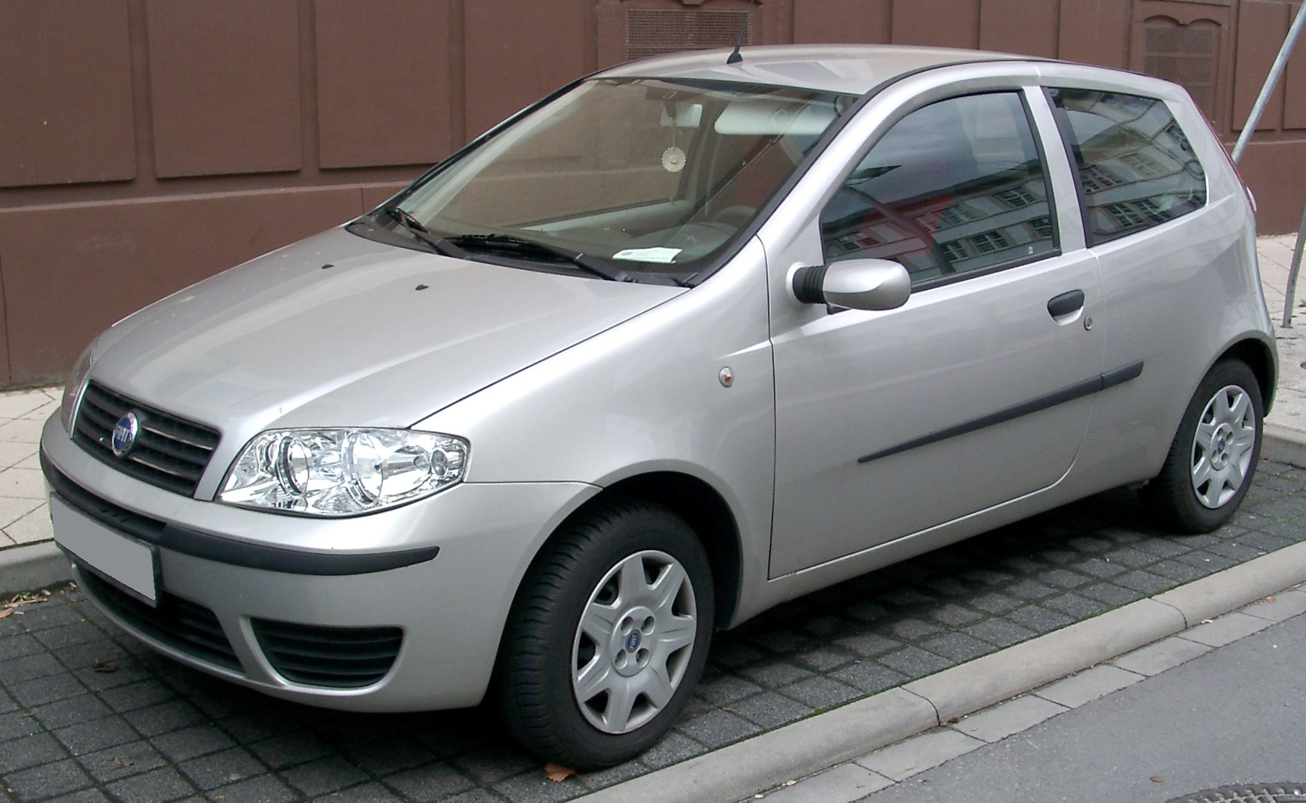 Fiat Punto, 2. Generation